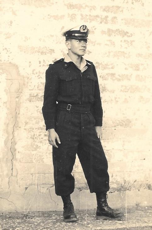 בקורס קצינים בבהד 1 – כפר סירקין 1958